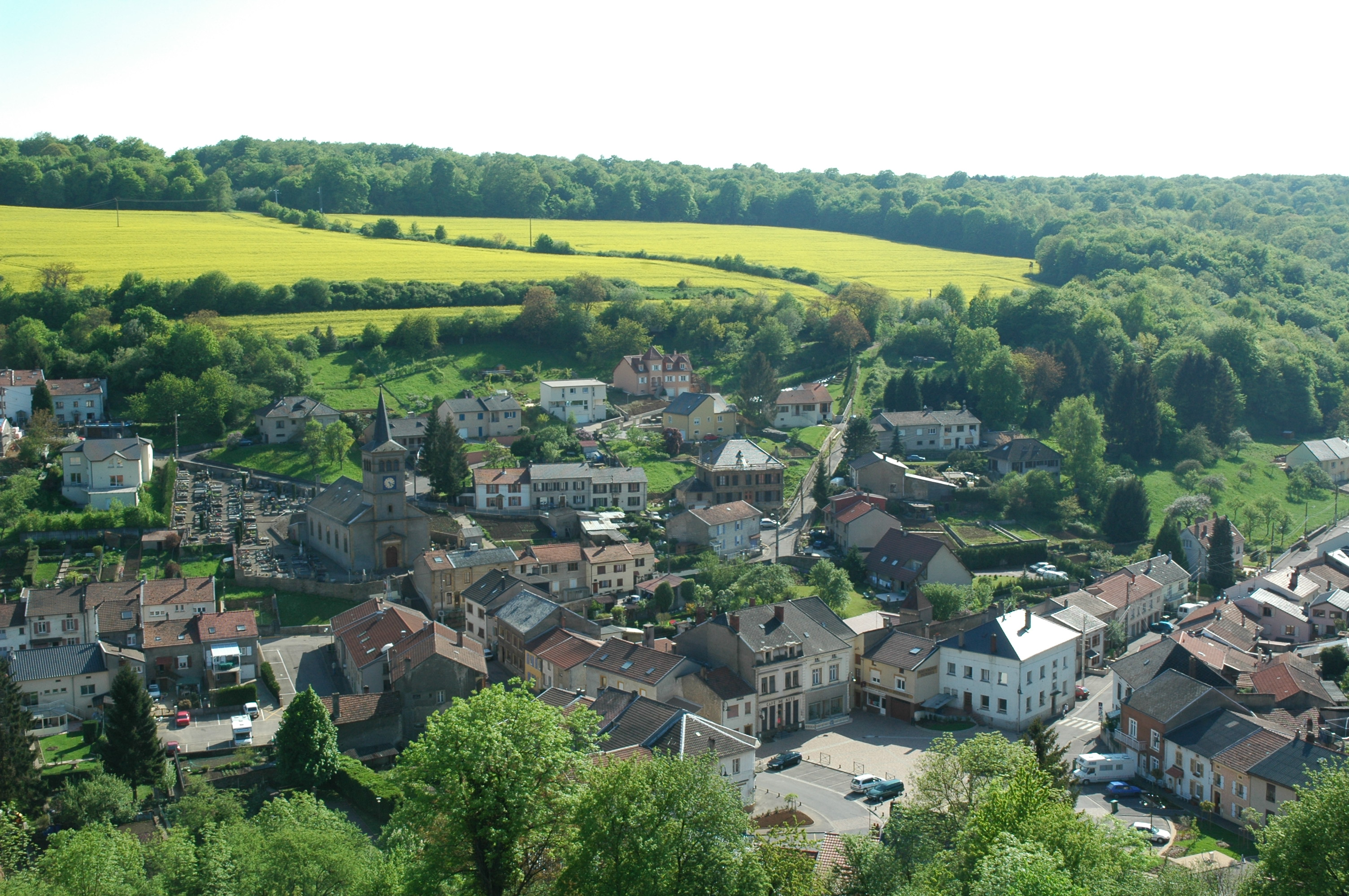 Vue sur la Côte de Moyeuvre